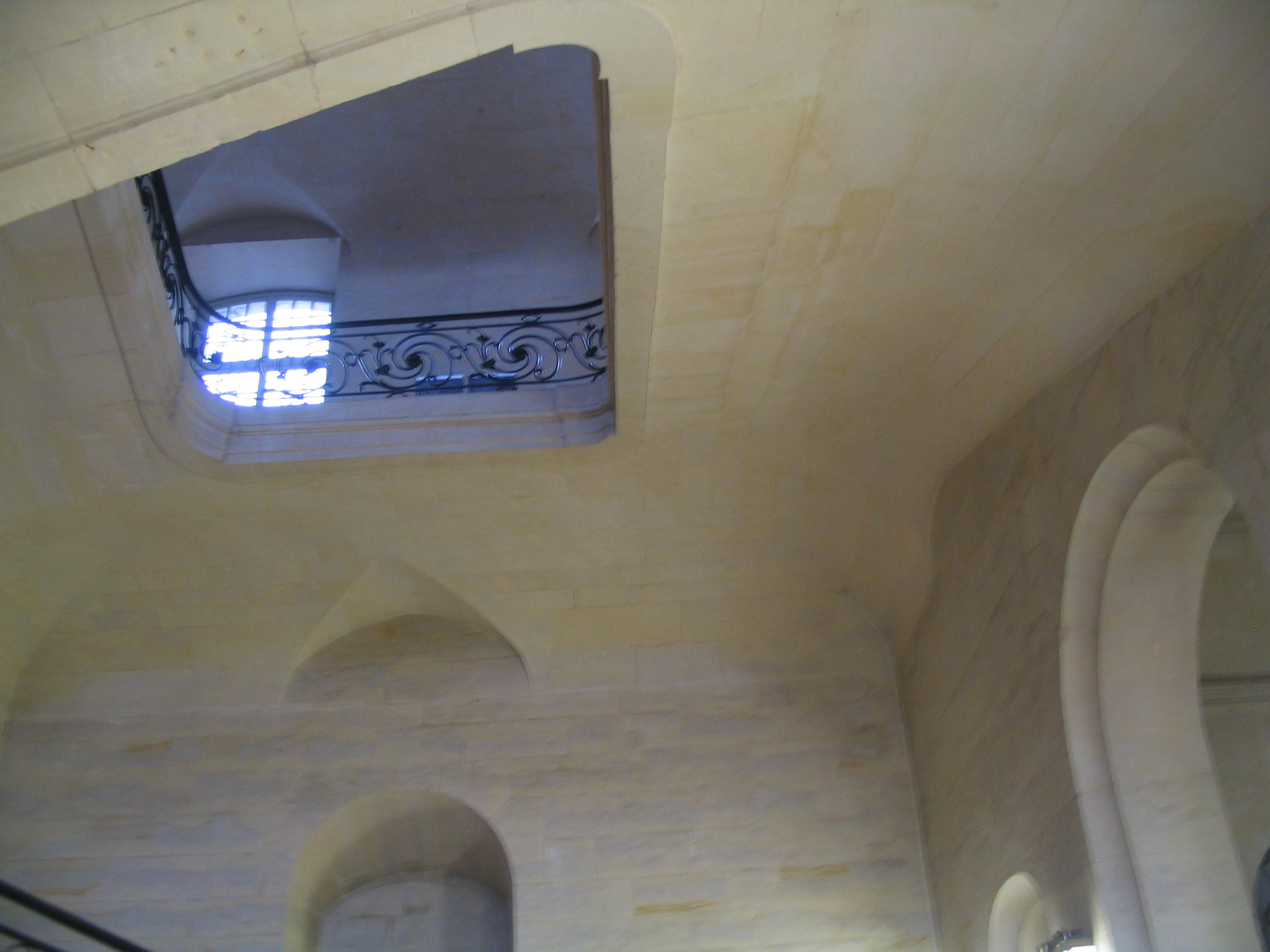 Détail d'une cage d'escalier de l'abbaye aux Hommes, à Caen. La construction de cet escalier est remarquable, puisqu'aucun mortier n'a été utilisé. Chaque pièce est unique, et c'est l'imbrication parfaite des pièces qui permet à l'escalier de tenir.